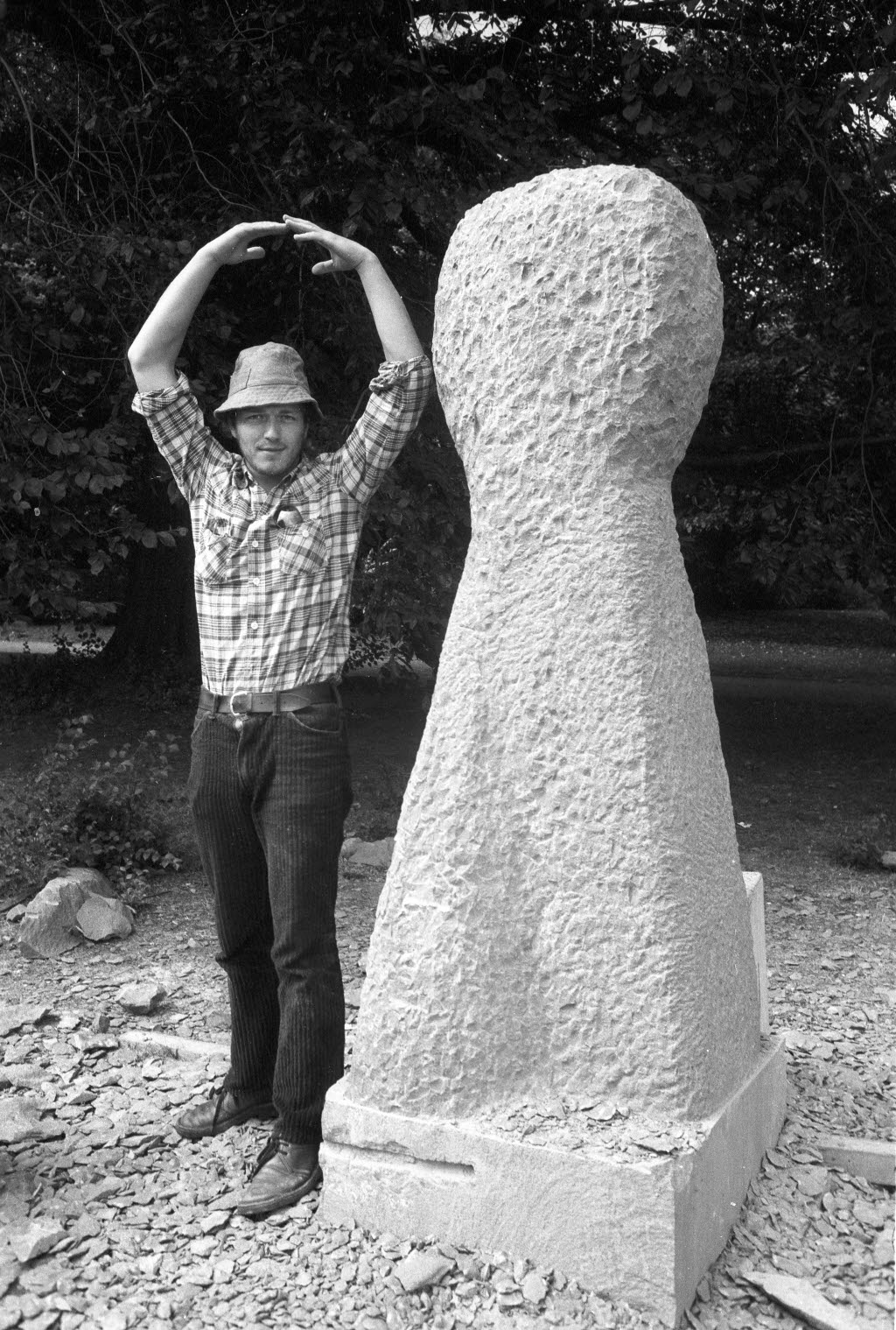 Das Symposium soll dem interessierten Publikum ermöglichen, Dozenten und Studenten vom Fachbereich Gestaltung der Fachhochschule (FH) Kiel zuzusehen, wie sie aus rohen Steinblöcken künstlerische Skulpturen gestalten. Im Bild meißelt Student Ben Siebenrock aus einem Dolomitblock aus dem Sauerland einen Poller.